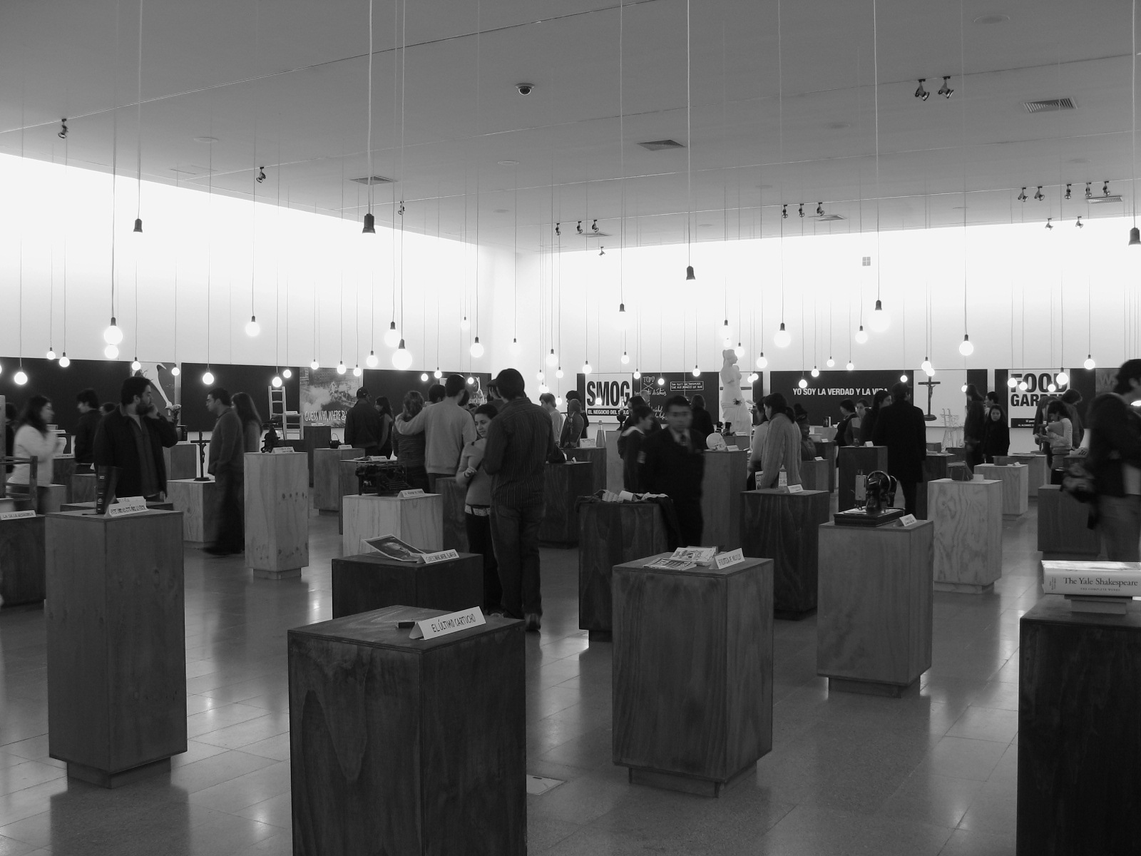 weno weno!